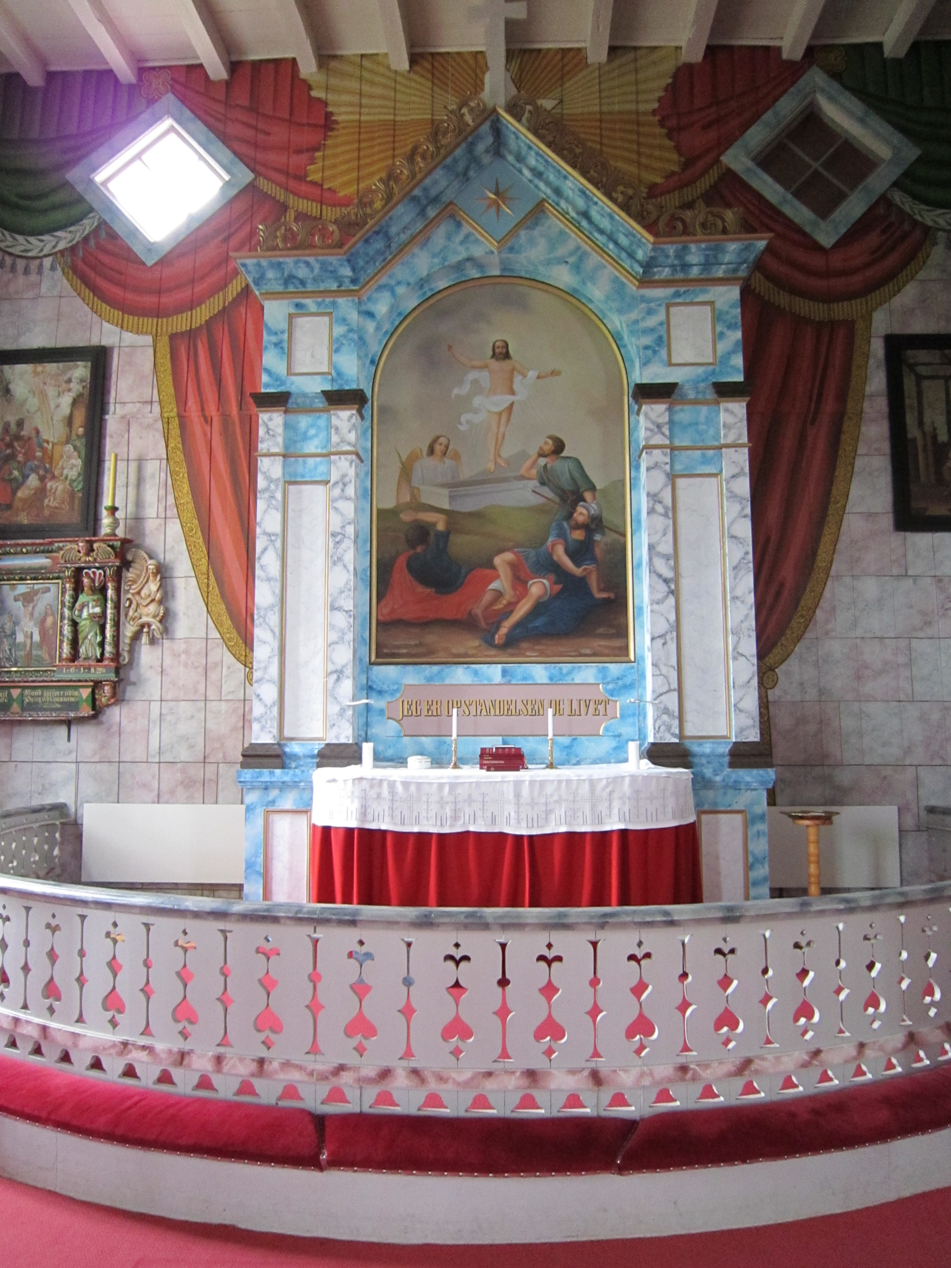 Altertavlen i Os kirke i Østerdalen